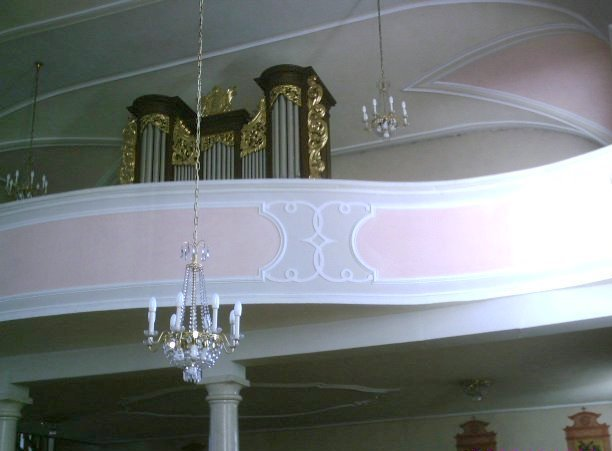 Orgel auf Empore